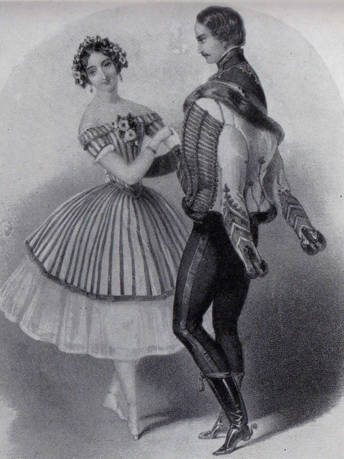 Carlota Grissi y Lucien Petipa en Paquita.